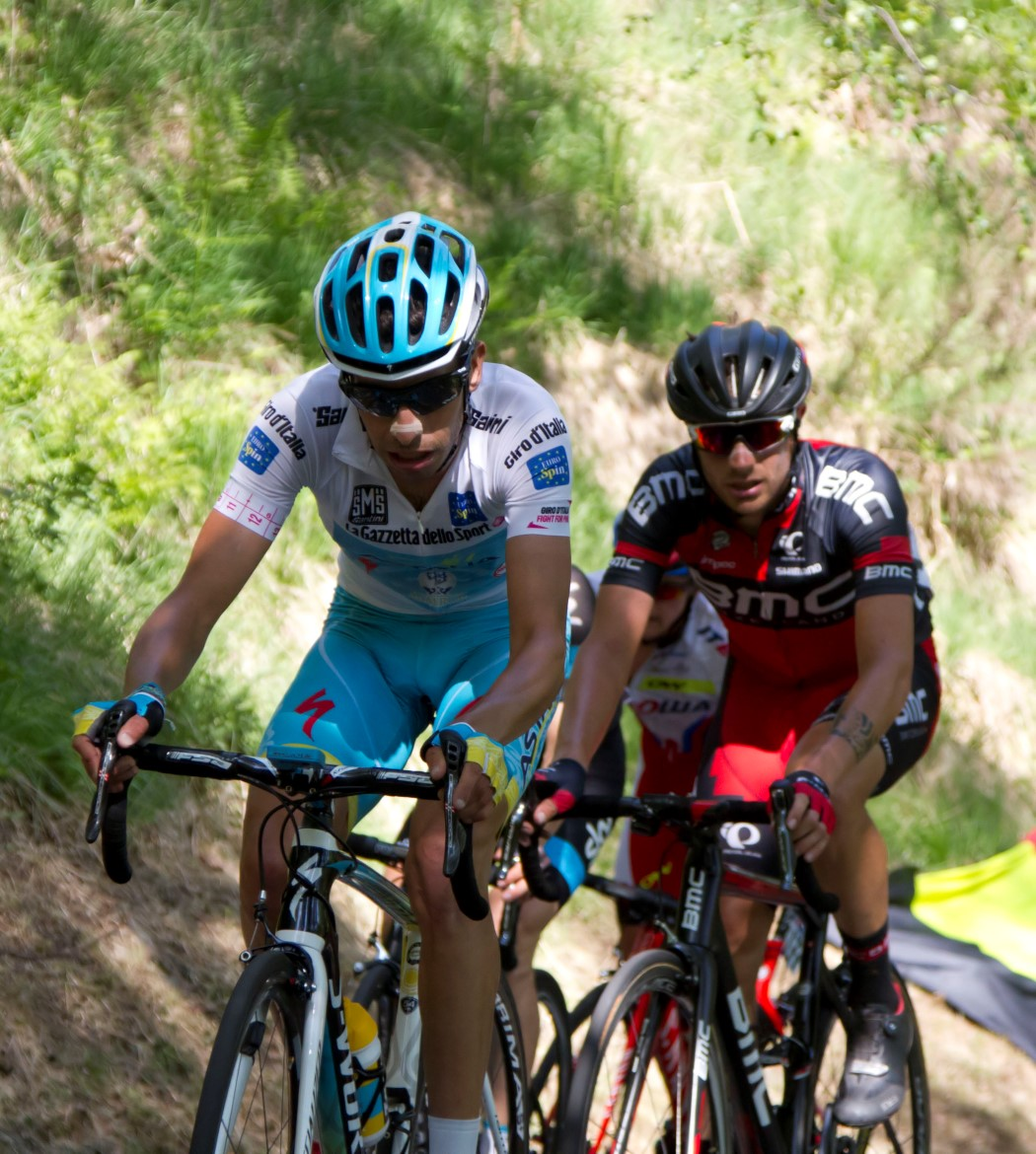 280 aru